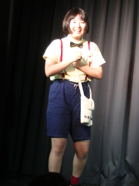 いかちゃん (お笑い芸人) 2018年11月